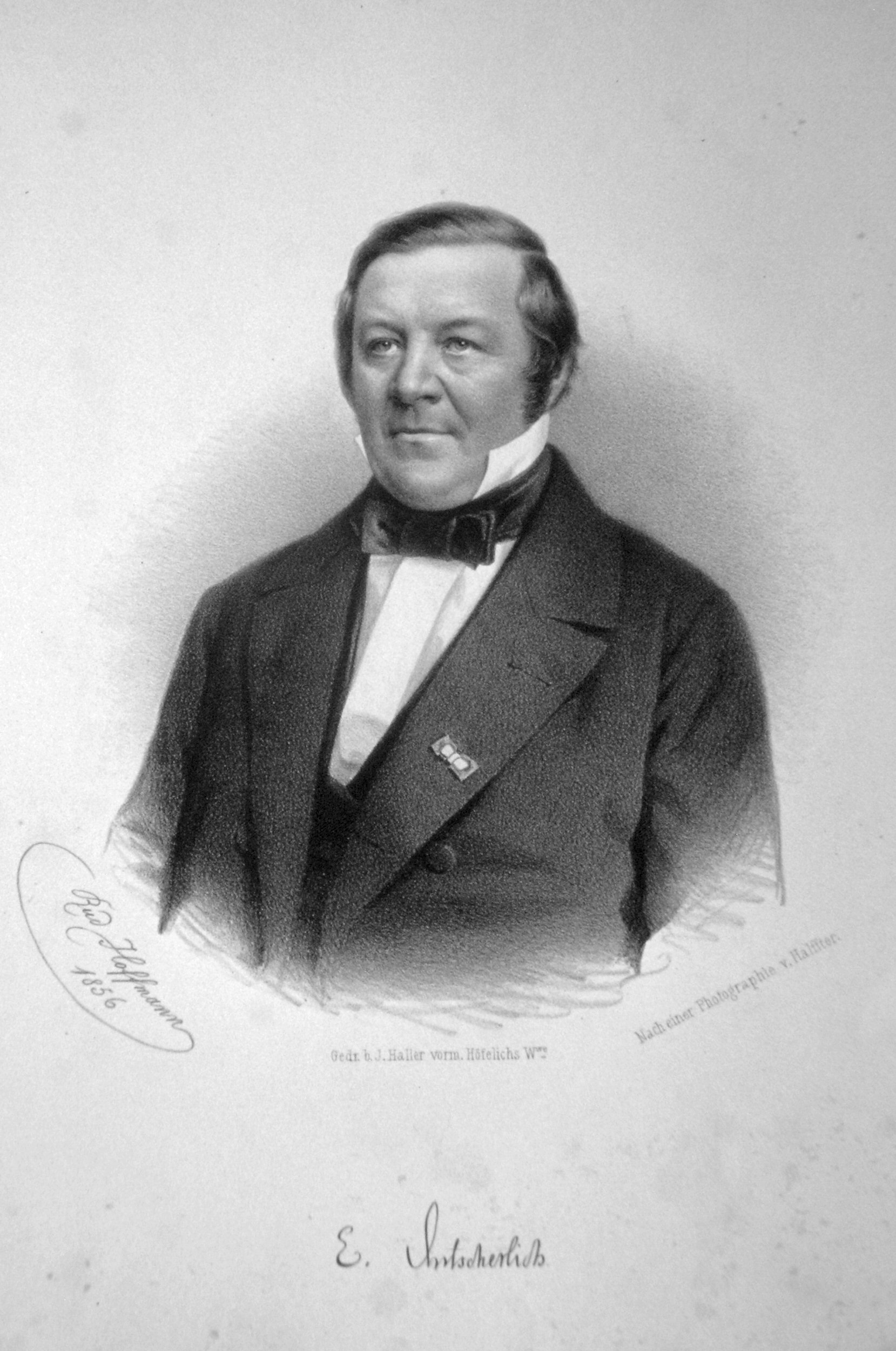 Eilhard Mitscherlich (deutscher Chemiker), Lithographie von Rudolf Hoffmann, 1856. Nach einer Fotografie von Halffter